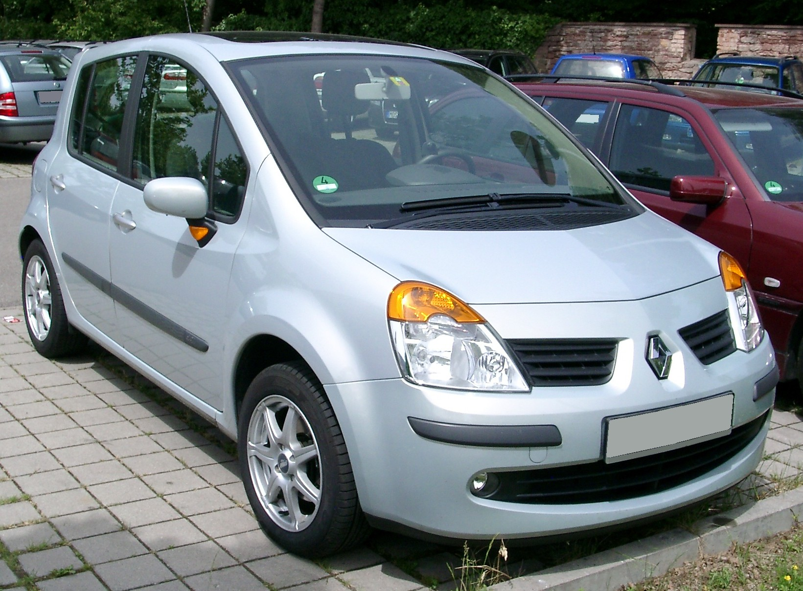 Renault Modus